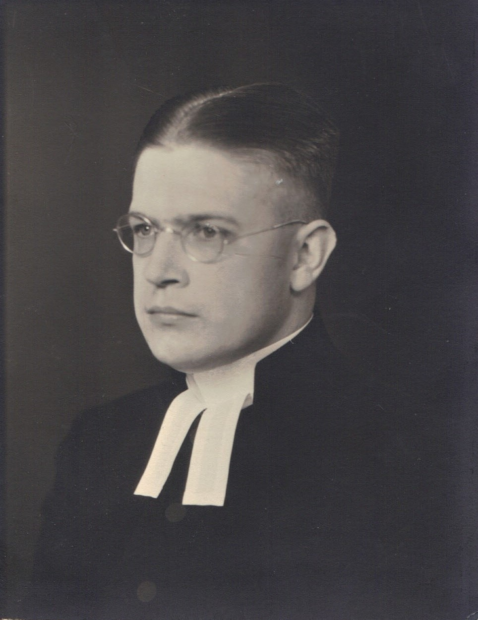 Porträtt av Wiking från familjens samlingar